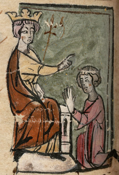 Миниатюра "Эдуард I (слева) провозглашает своего сына Эдуарда (справа) принцем Уэльским". Ms. Cotton Nero D. II., fol. 191 v. Британская библиотека